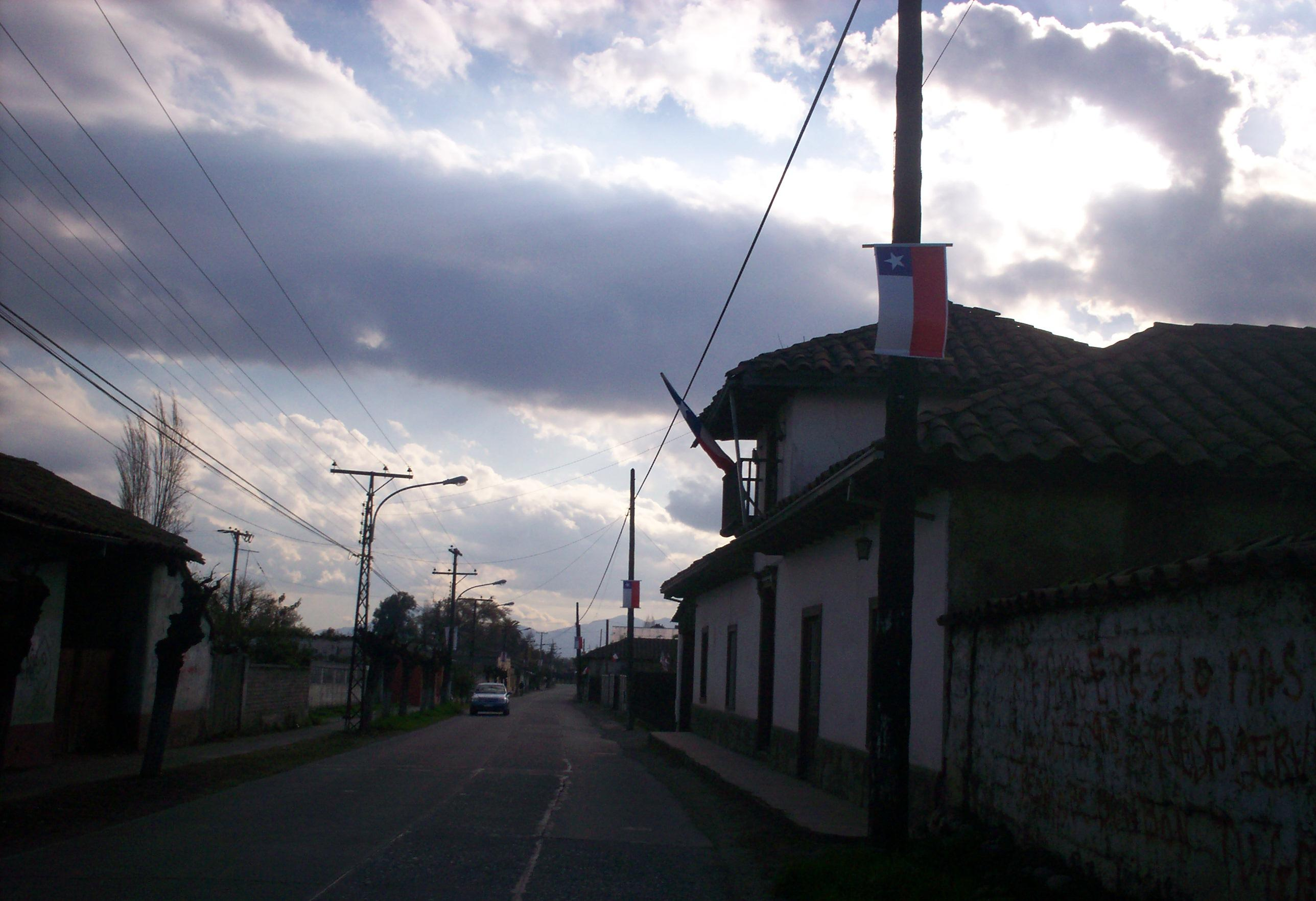 Olivar, Región del Libertador General Bernardo O'Higgins, Chile.